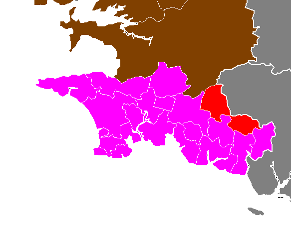 Maps of arrondissements and cantons of France: Arrondissement de Quimper - Canton de Scaer.PNG (Département du Finistère , Arrondissement de Quimper)